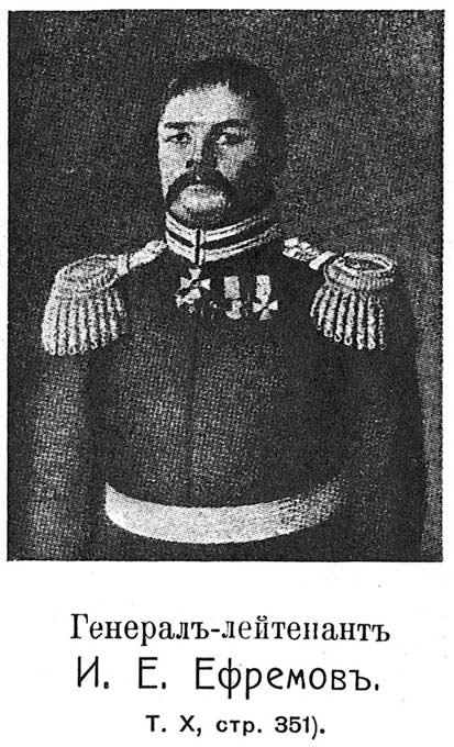 Этот рисунок был использован для иллюстрирования статьи «Ефремовы» опубликованной в шестнадцатом томе «Военной энциклопедии», который был издан книгоиздательским товариществом И. Д. Сытина в 1914 году в столице Российской империи городе Санкт-Петербурге. Более подробное описание к этой иллюстрации можно прочесть в указанной выше статье на сайте Русской Викитеки.